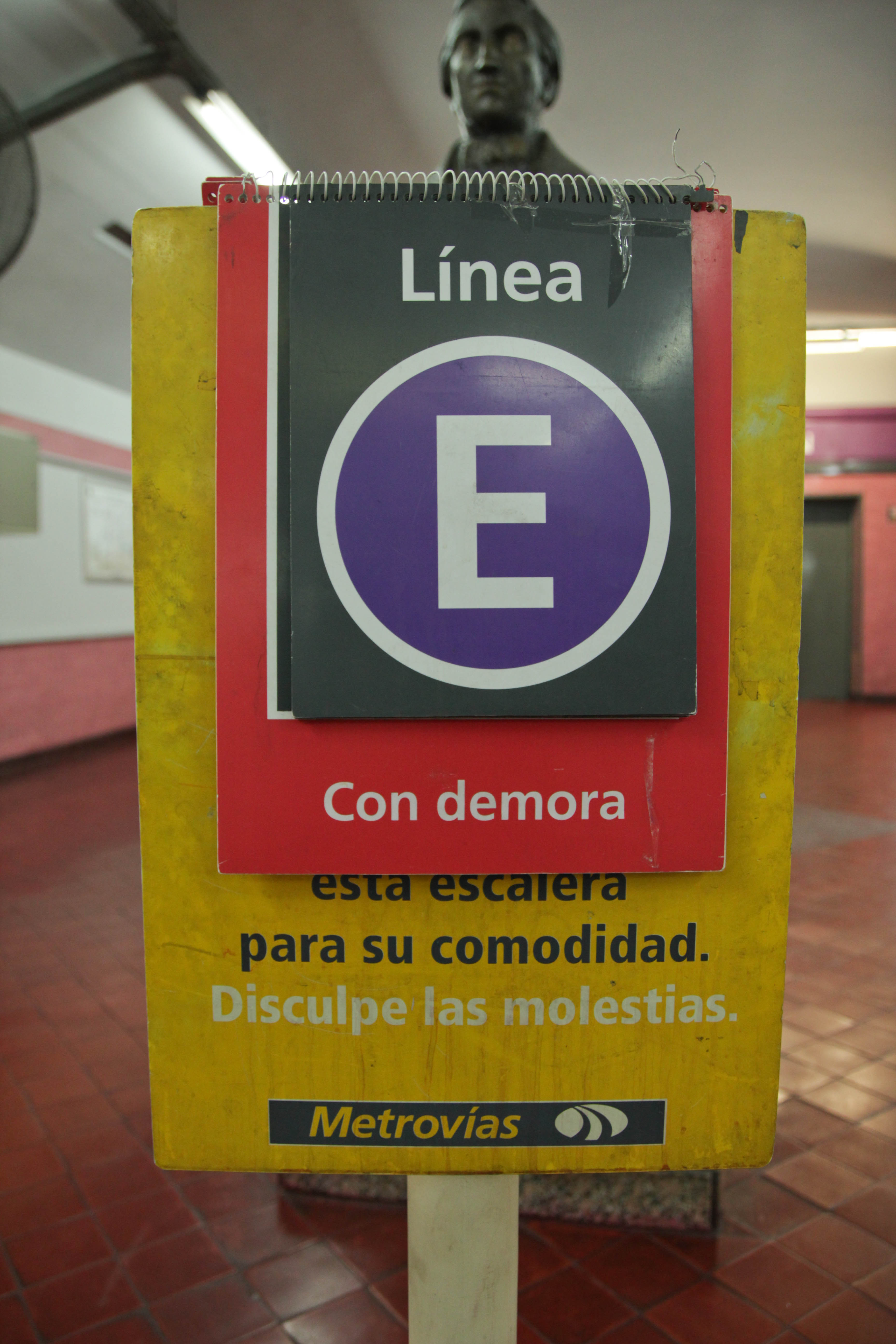 Cartel indicando demoras en el línea E del Subte de Buenos Aires.